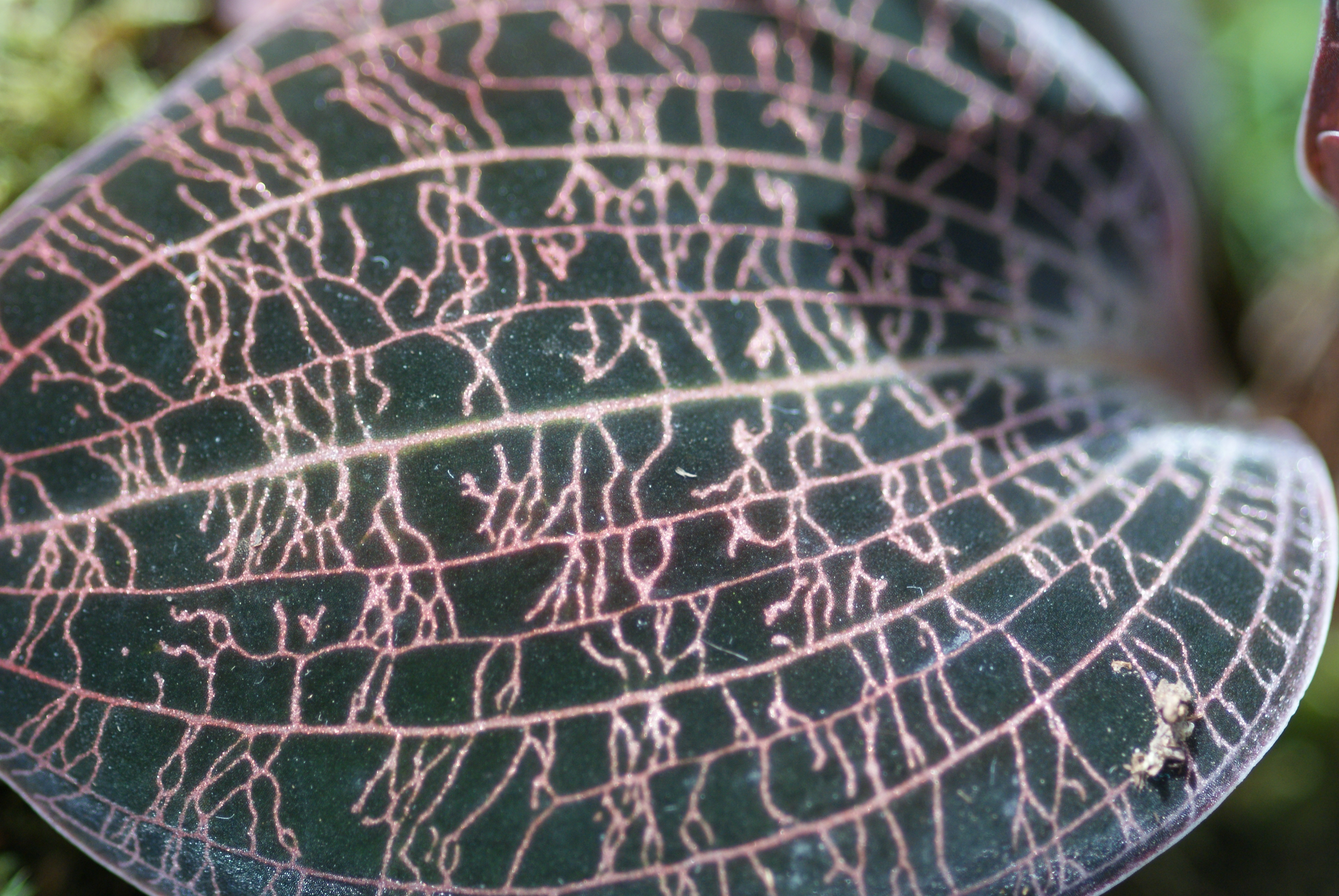 Dossinia marmorata leaf